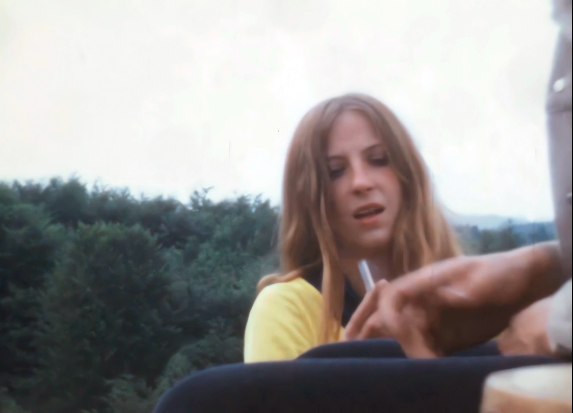 Manuela von Perfall, Burg Rötteln 1971